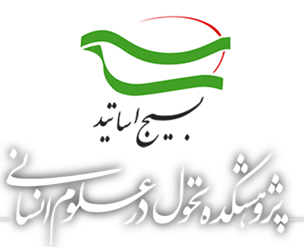 لوگو پژهشکده